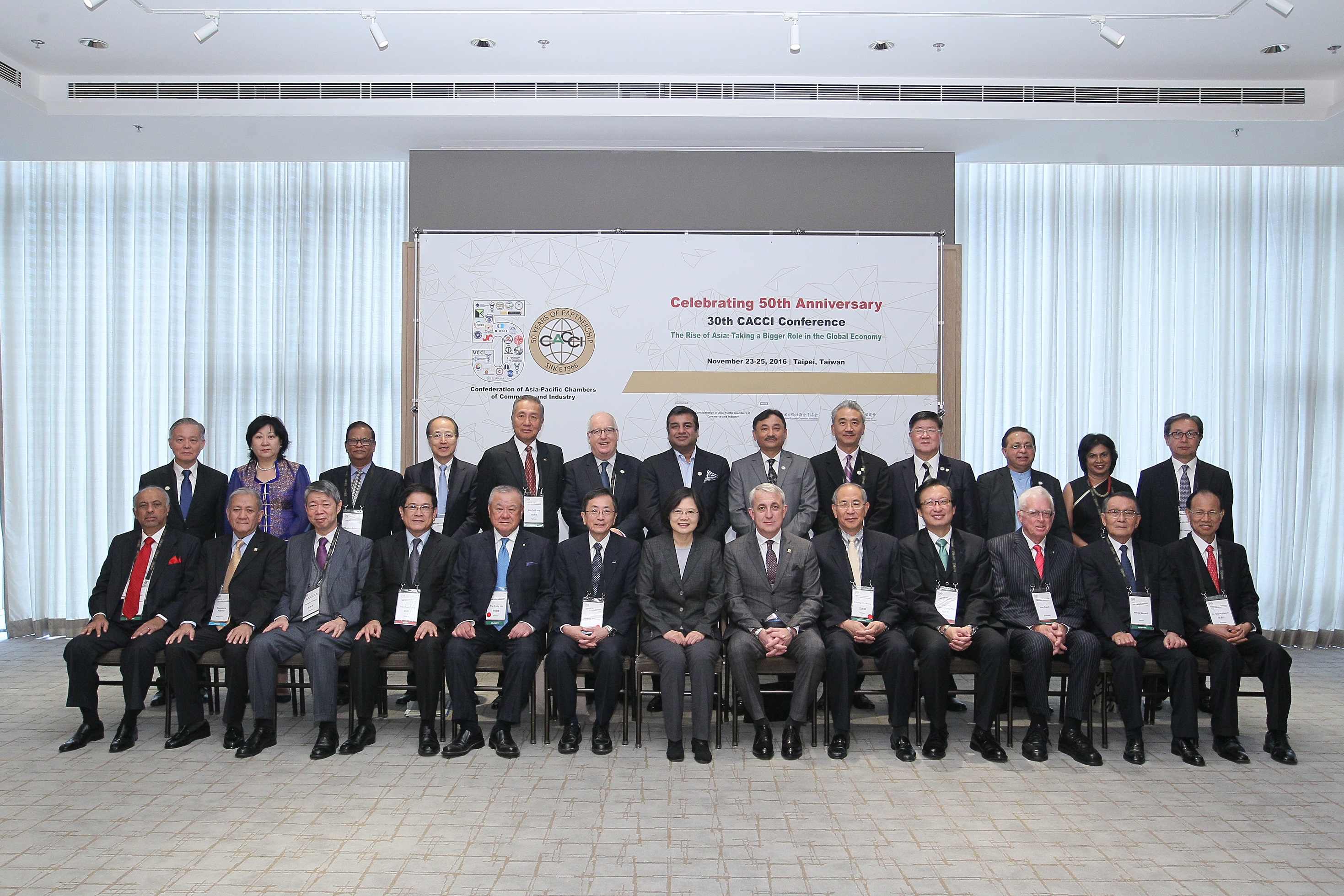 11.24 總統出席亞太商工總會50週年慶祝大會暨第30屆會員大會，會後合影